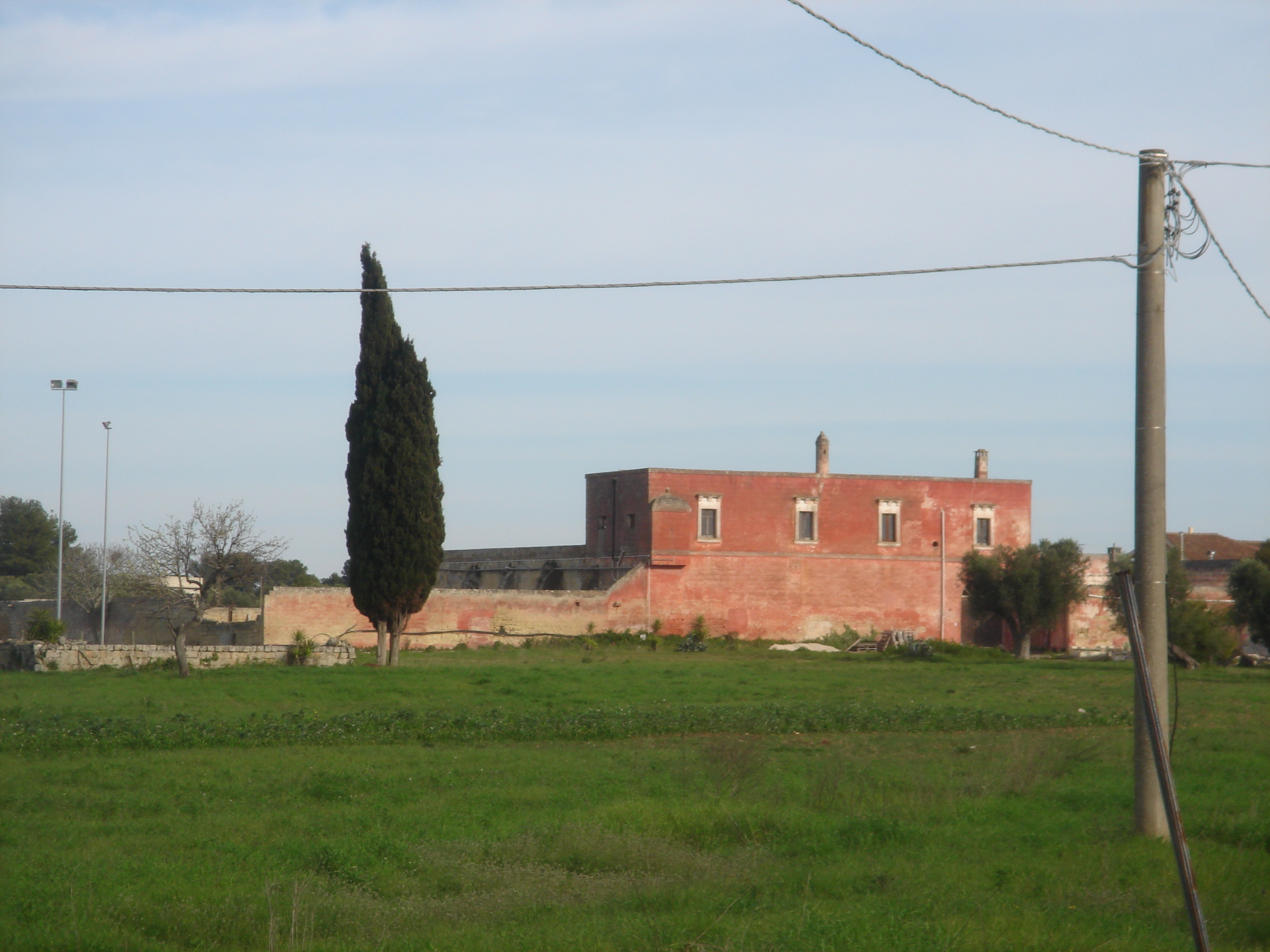 Masseria Casa Rossa con tipico comignolo arbëreshë